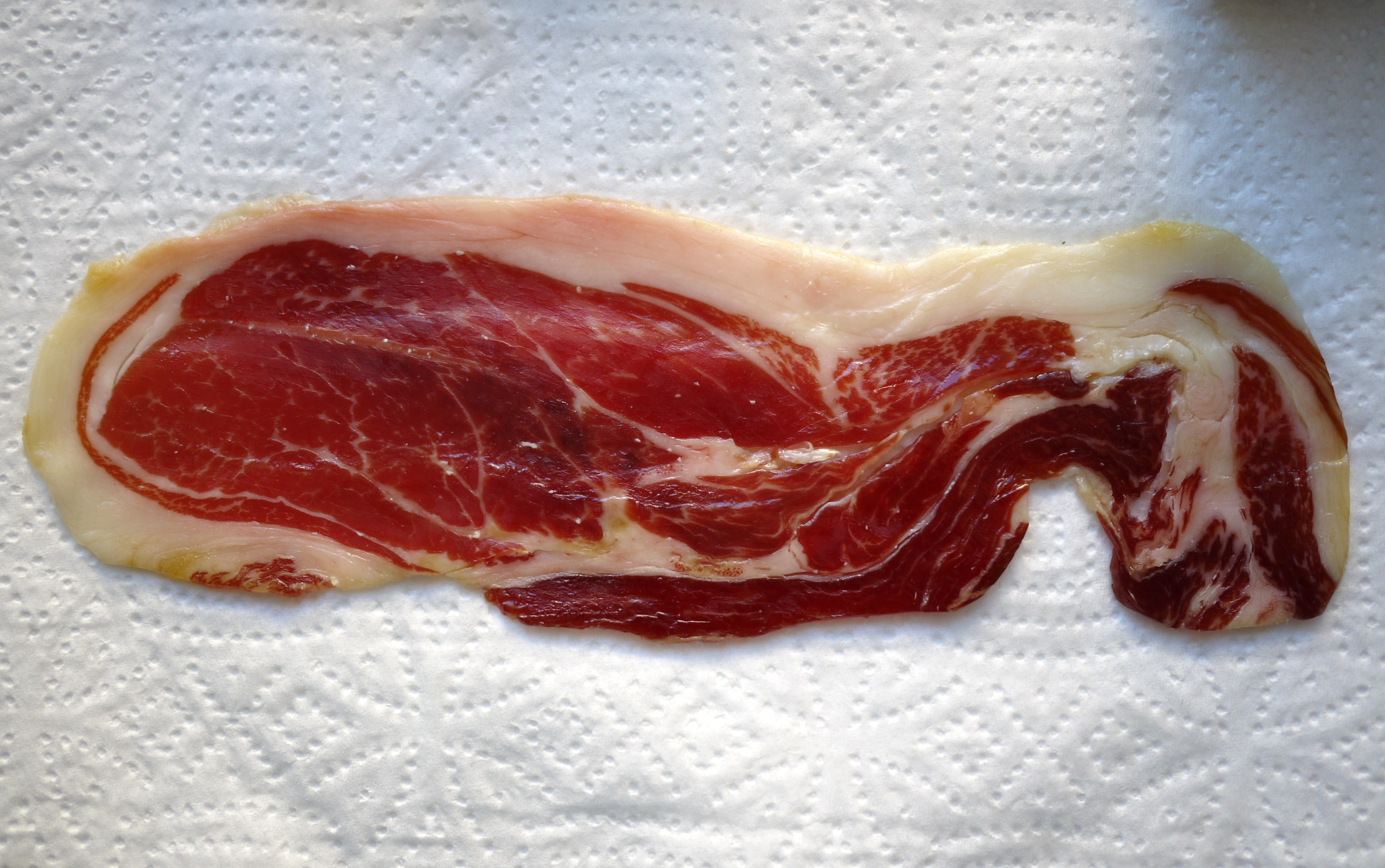 Une vue rapprochée sur une tranche de paletilla de porc ibérique nourris avec des glands (en espagnol "paletilla de cerdo ibérico de bellota"). Cette charcuterie est obtenue avec les pattes antérieures du porc ibérique de bellota (le porc de race ibérique nourri avec des glands). La "paletilla" n' est pas du jambon. Le jambon est obtenu avec les pattes postérieures du porc. Bellota: gland.